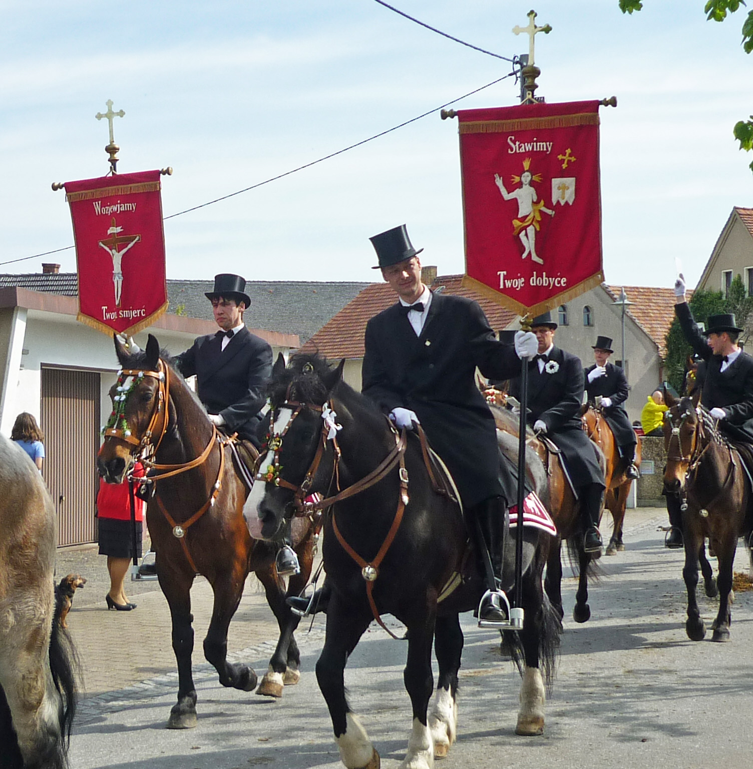 Osterreiter aus Wittichenau in Ralbitz Hornjoserbsce: Kulowscy křižerjo w Ralbicach.